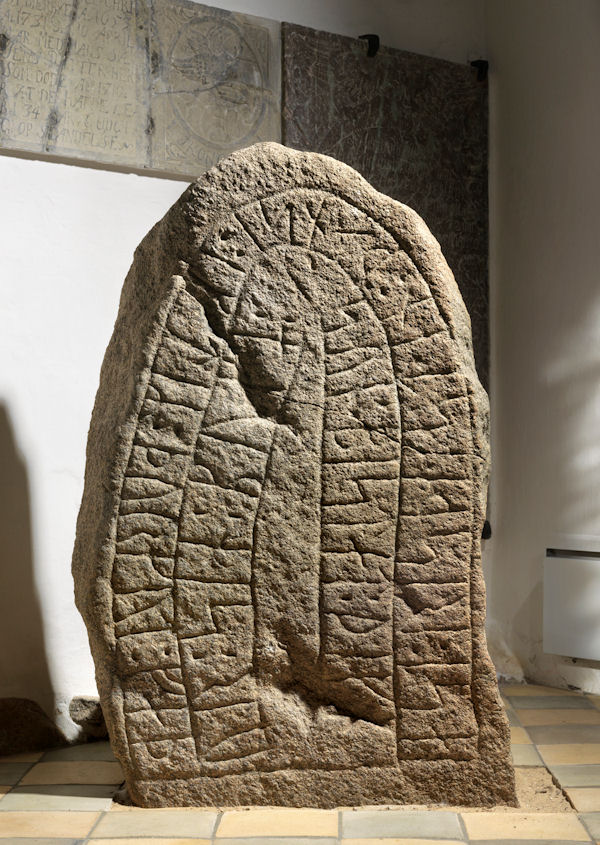 Foto af Roberto Fortuna